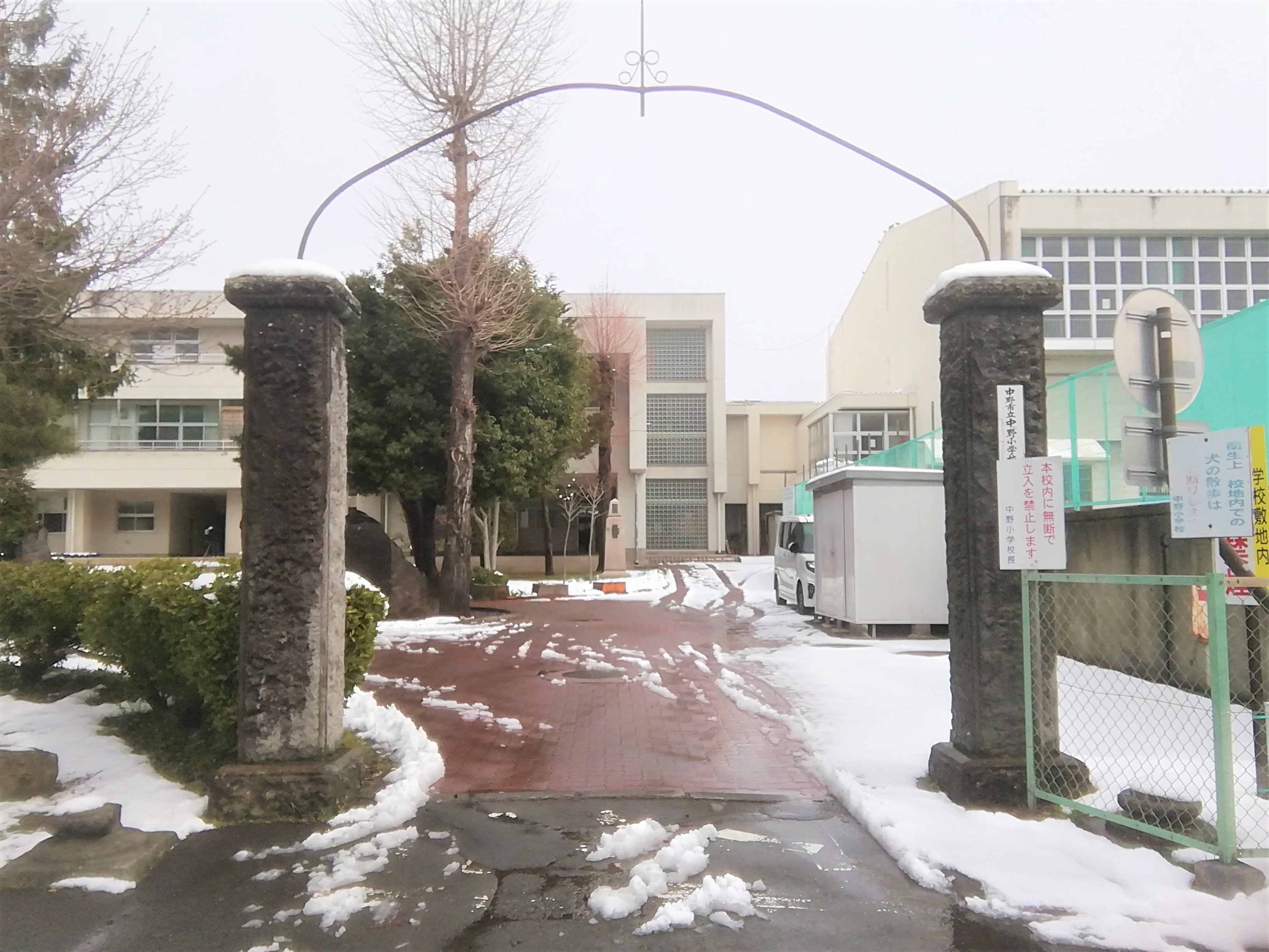 中野市立中野小学校（2020-3-30）